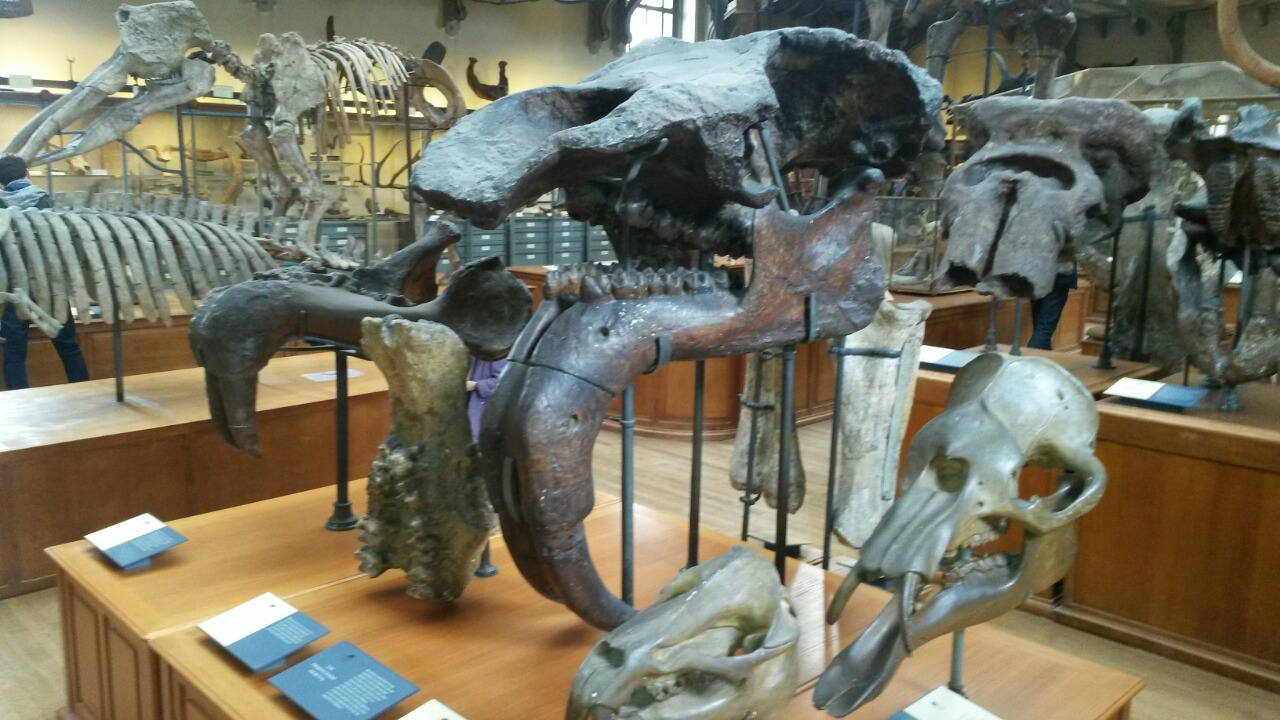 Deinotherium giganteum